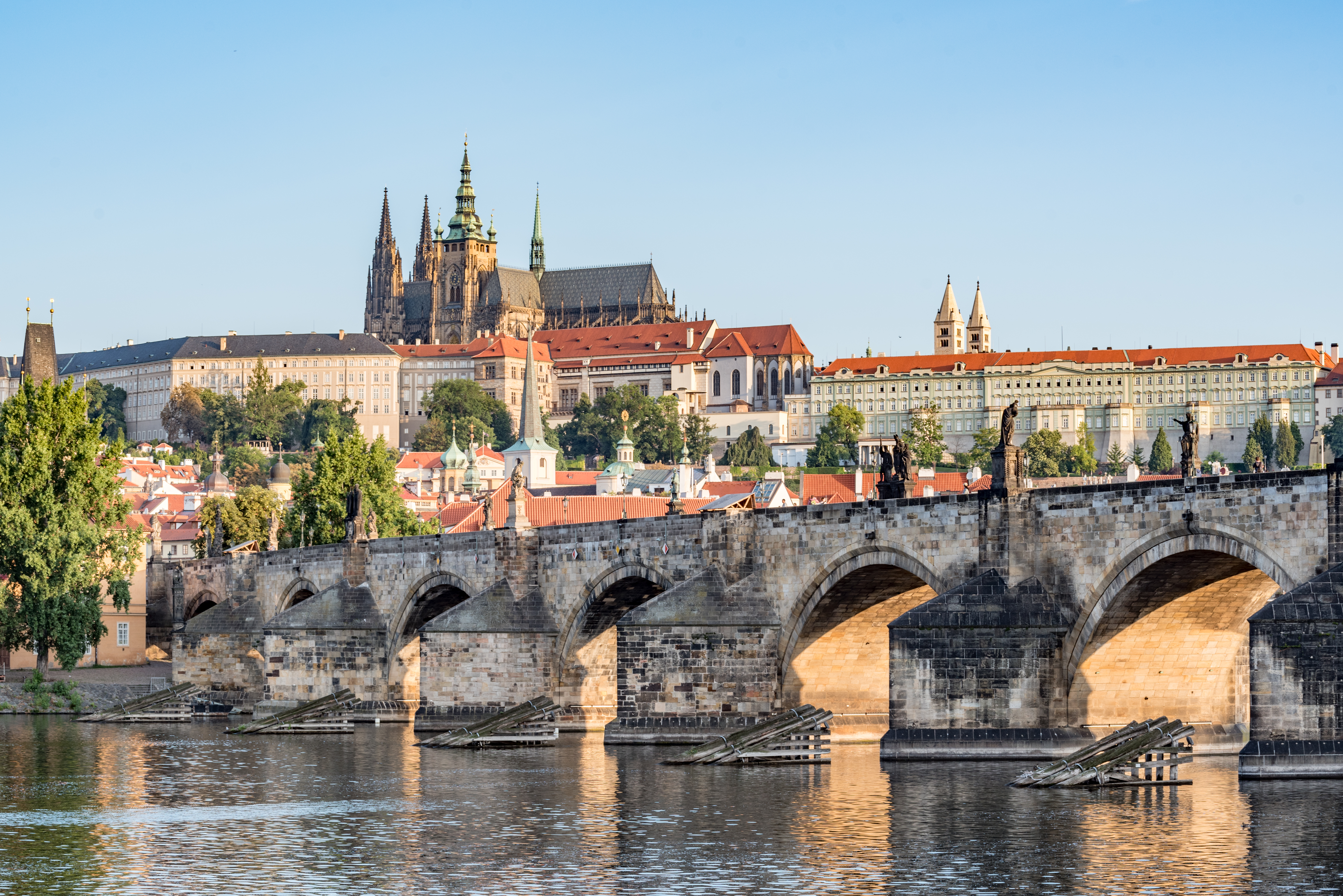 Praha 1, Karlův most